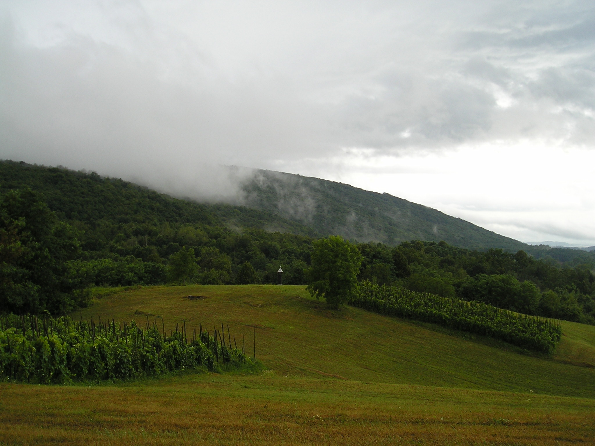 Gora Lipnik, općina Ribnik